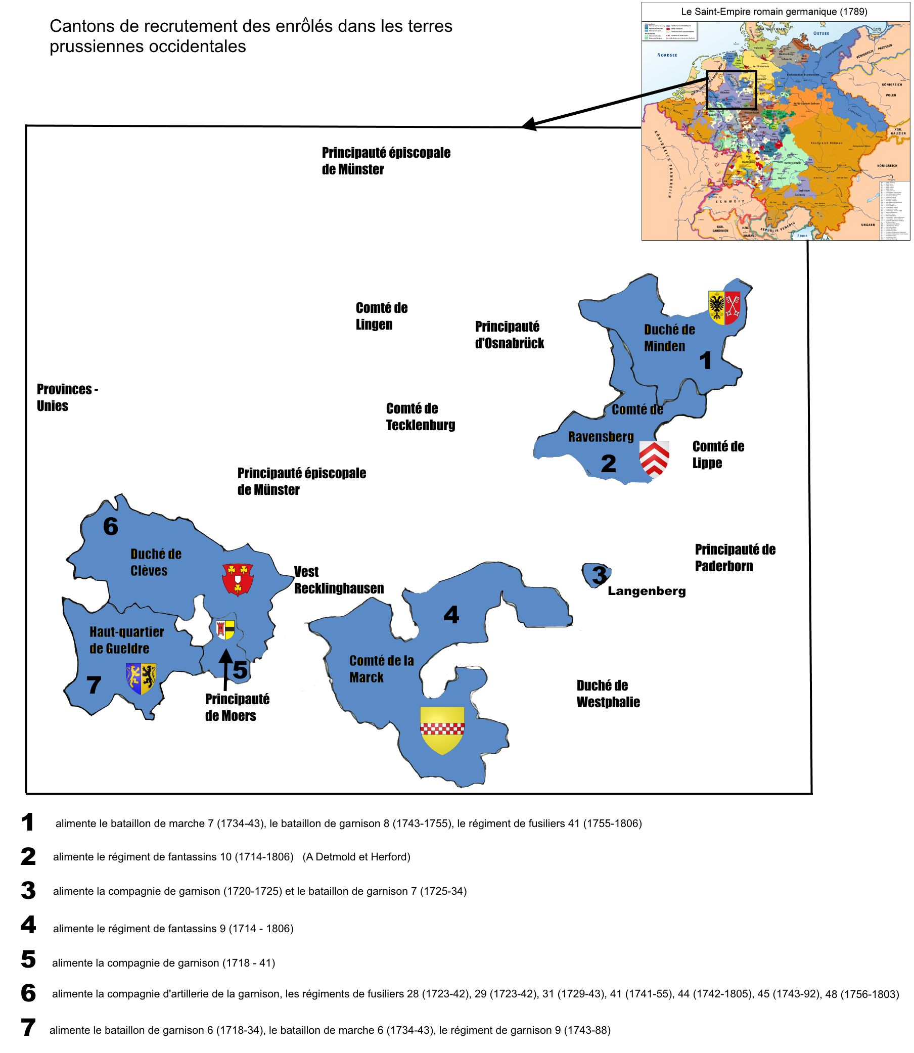 Carte des zones de recrutement des soldats prussiens en Westphalie